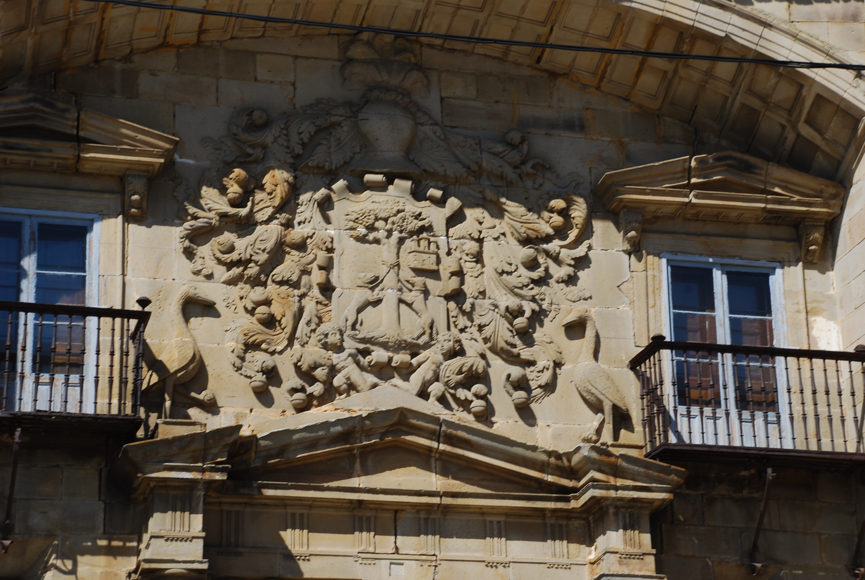 Palacio de Chiloeches en Espinosa de los Monteros (Burgos - España).